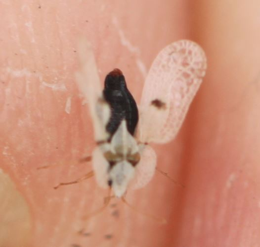 Platanen-Netzwanze (Corythucha ciliata) unmittelbar vor dem Abflug, am 21. Oktober 2019 am Stamm einer Platane in Walldorf/Baden